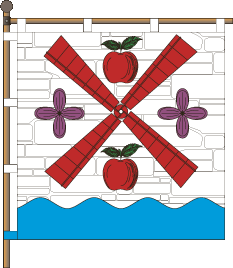 Прапор Недобоївської сільської територіальної громади